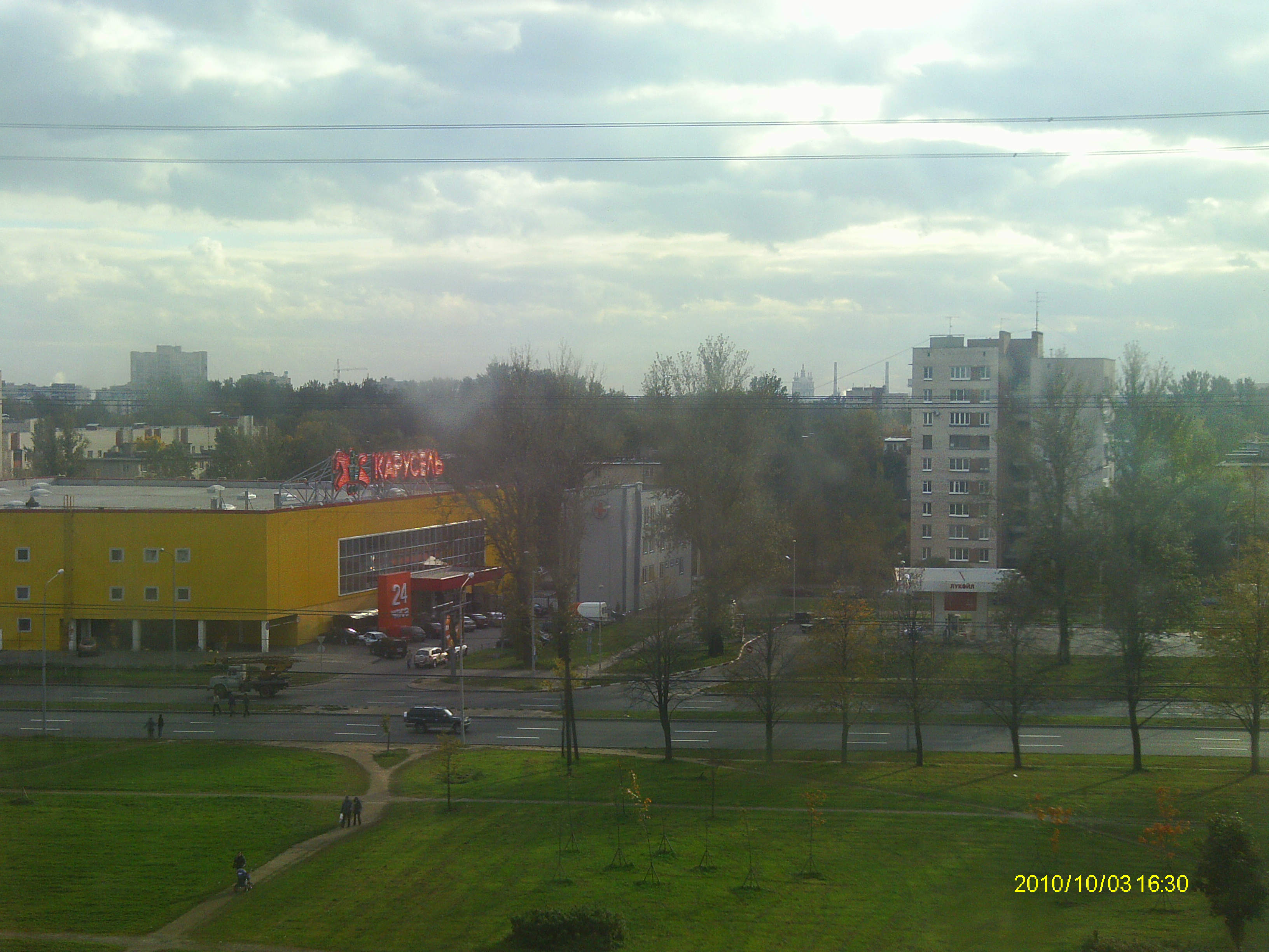 «Каруселька» у моего дома